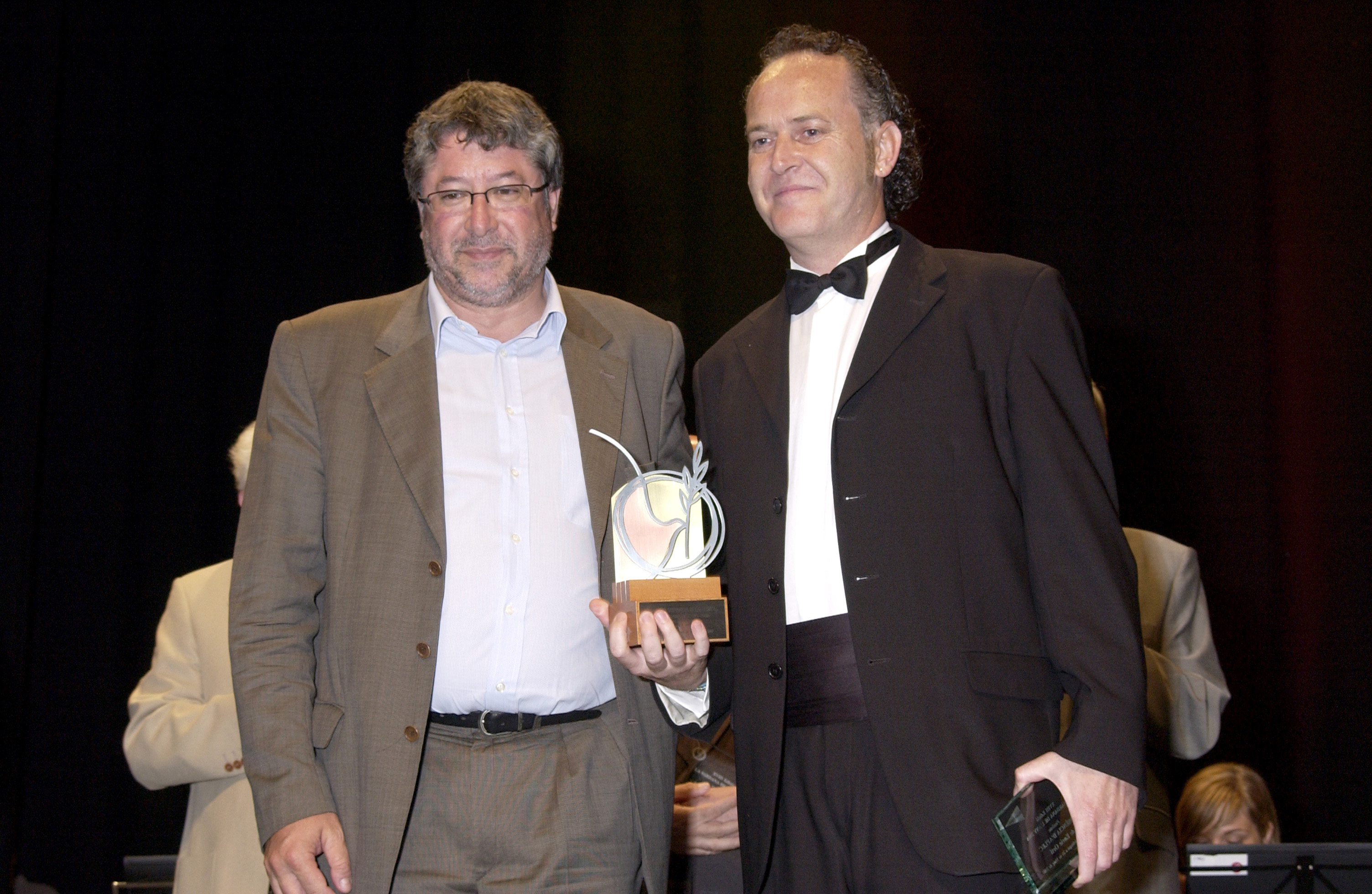 Lliurament del premi Sardana de l'Any a Enric Ortí